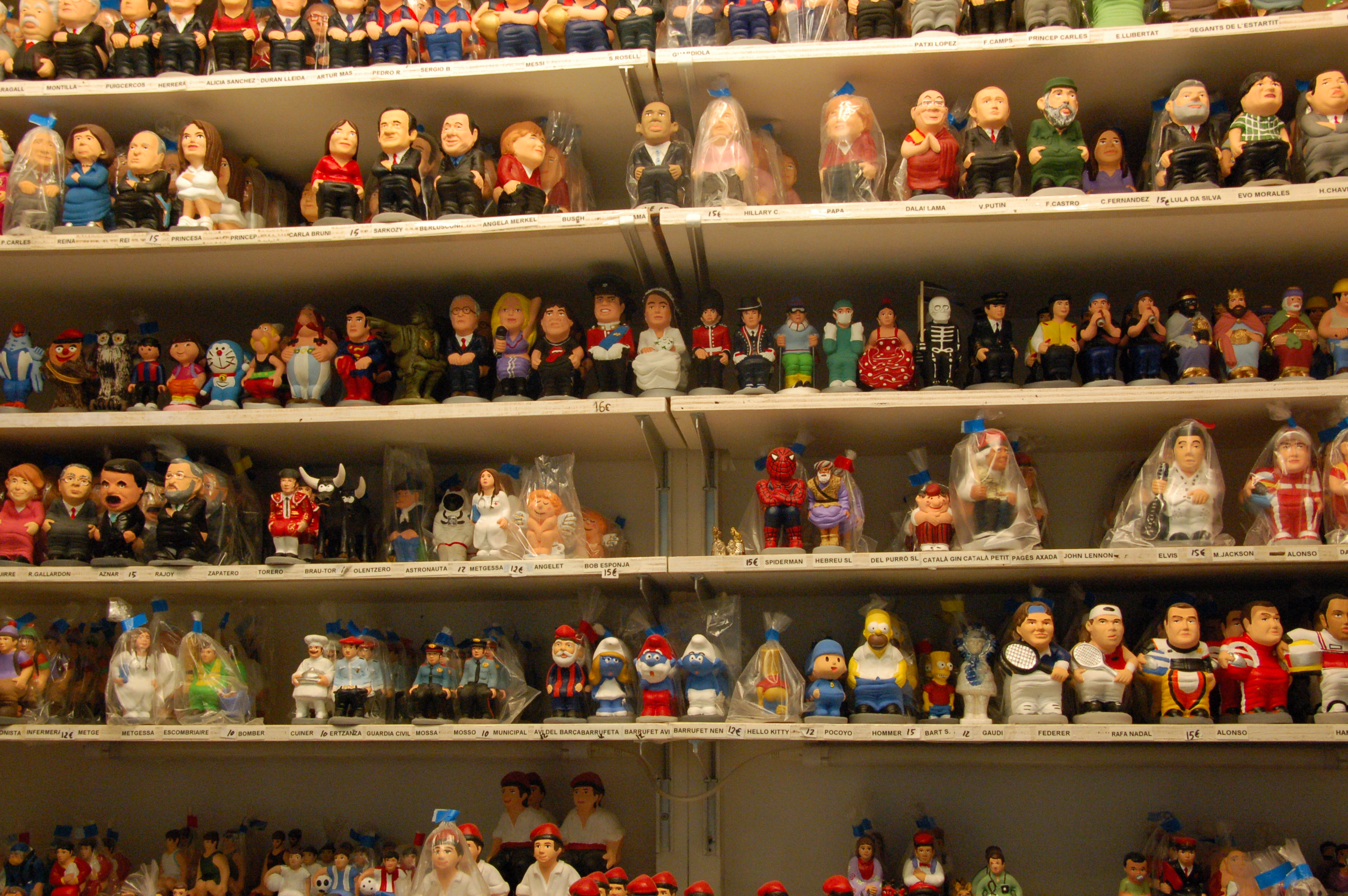 Foto de distintos caganers en nuestro taller.